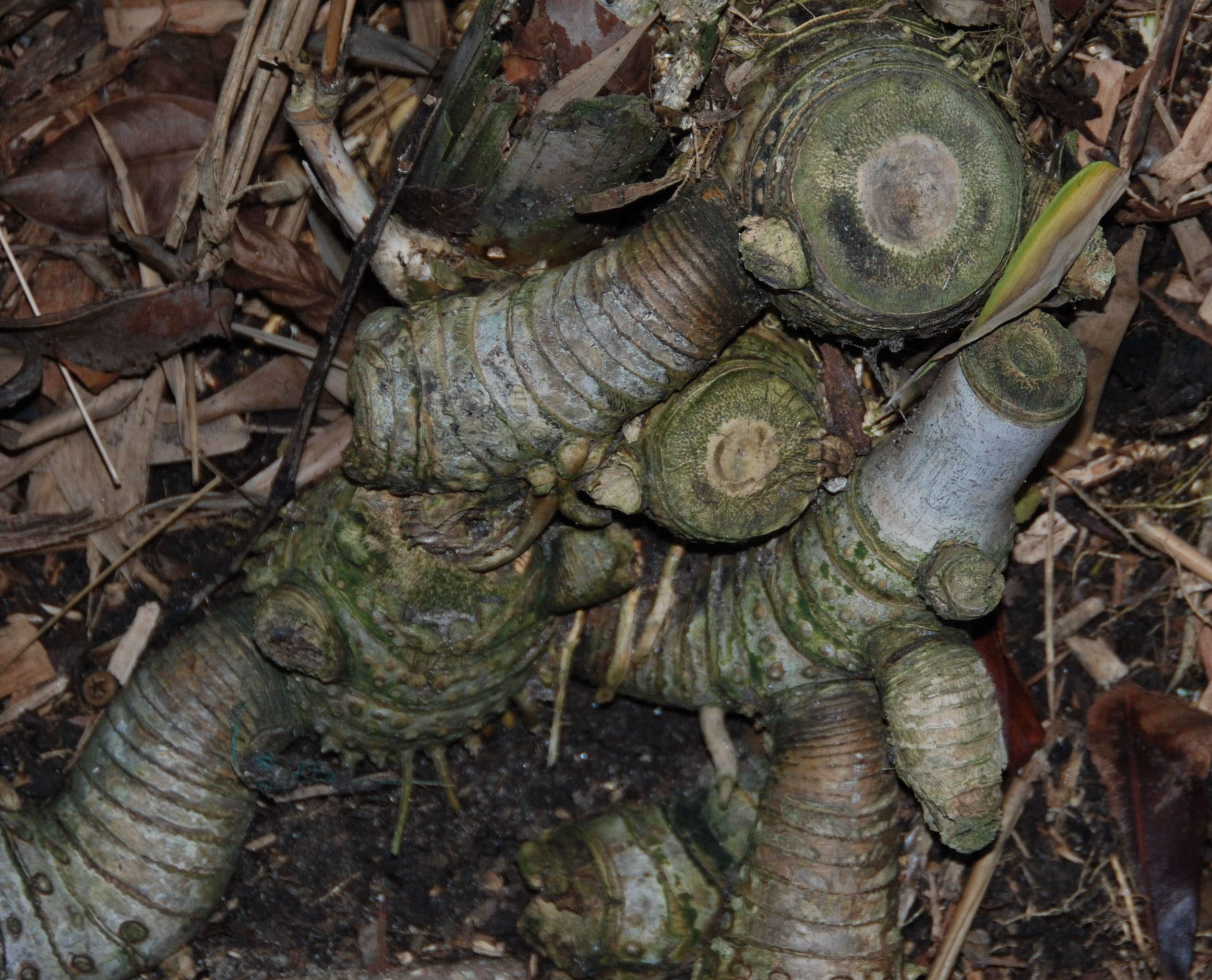 Shot Xmas day at San Diego Zoo (25 décembre 2006)